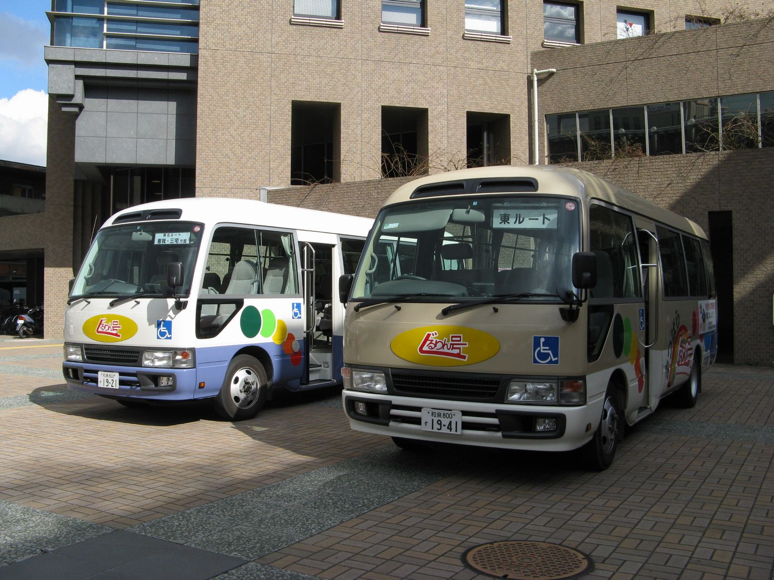 ぐるりん号 松原市役所にて 2008年2月8日 Bakkai撮影